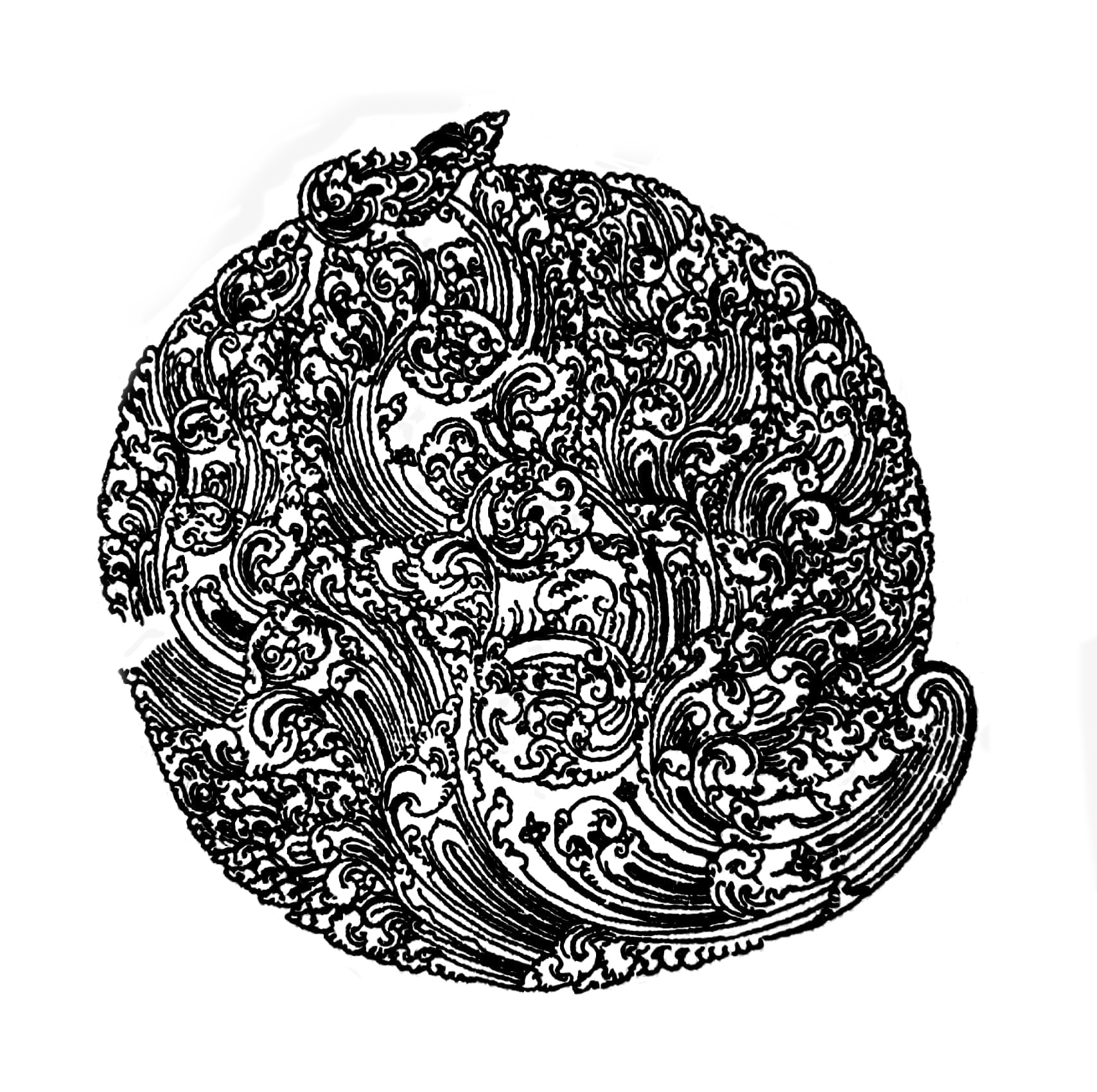 සිංහල: පාරම්පරික සිංහල සැරසිලි මෝස්තර